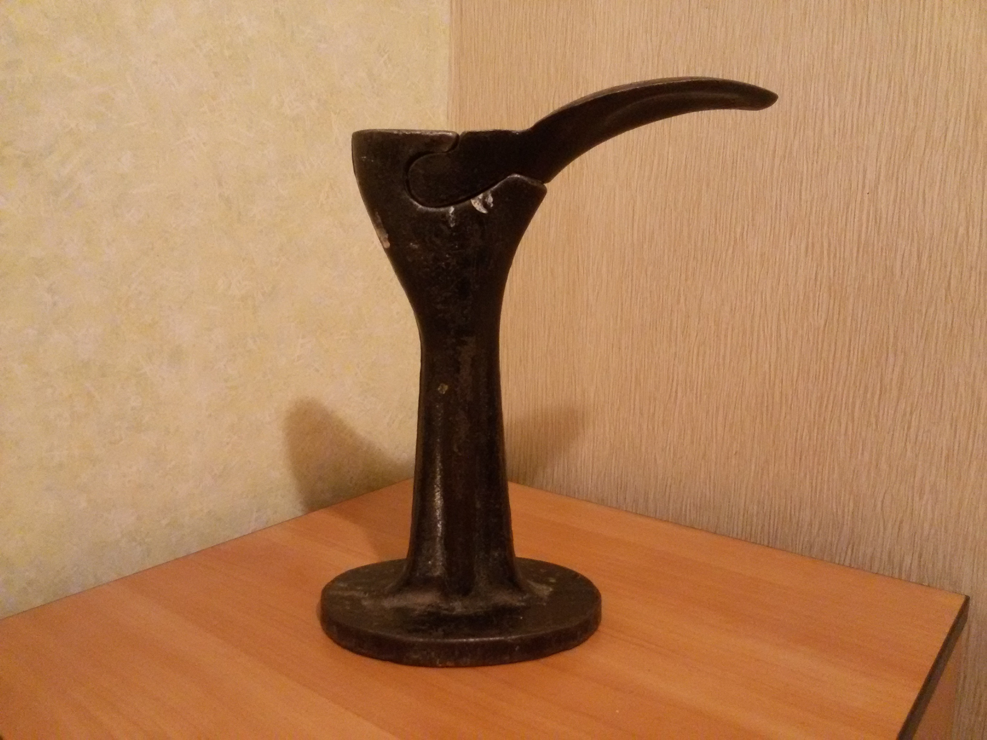 Лапа сапожная